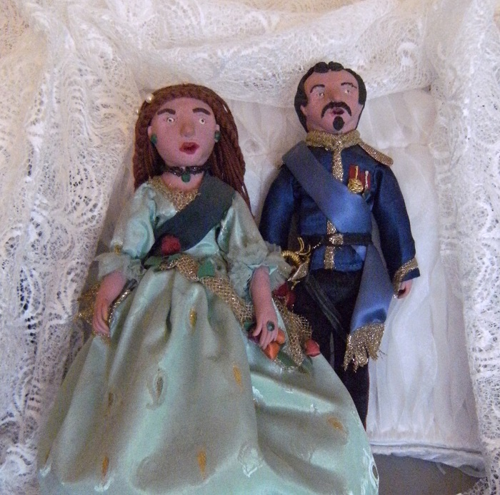 Sissi-Puppe zum Film "Ludwigs-Lust" von 1986, gestaltet von Tima die Göttliche